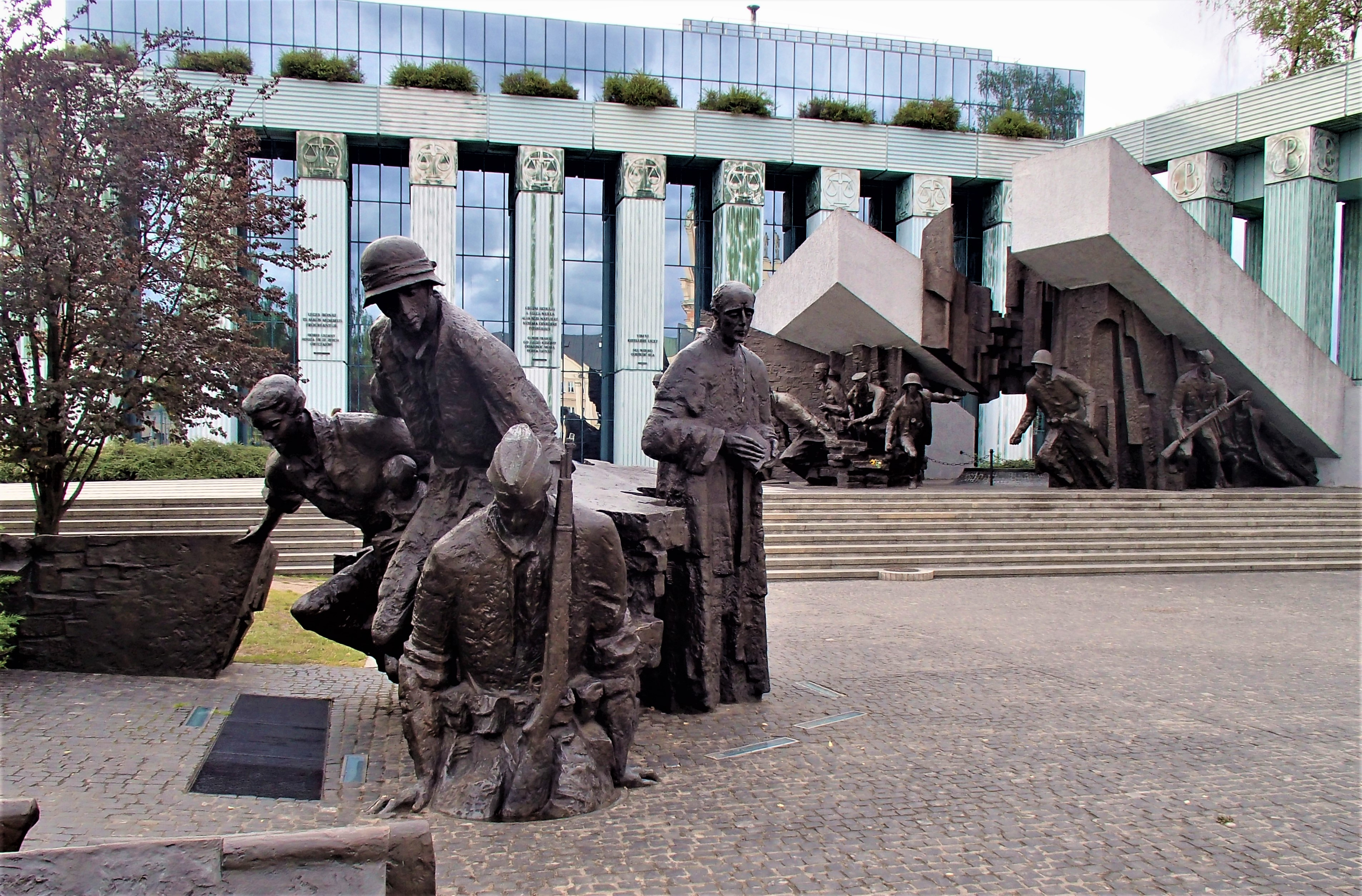 Pomnik Powstania Warszawskiego W tle gmach sądów